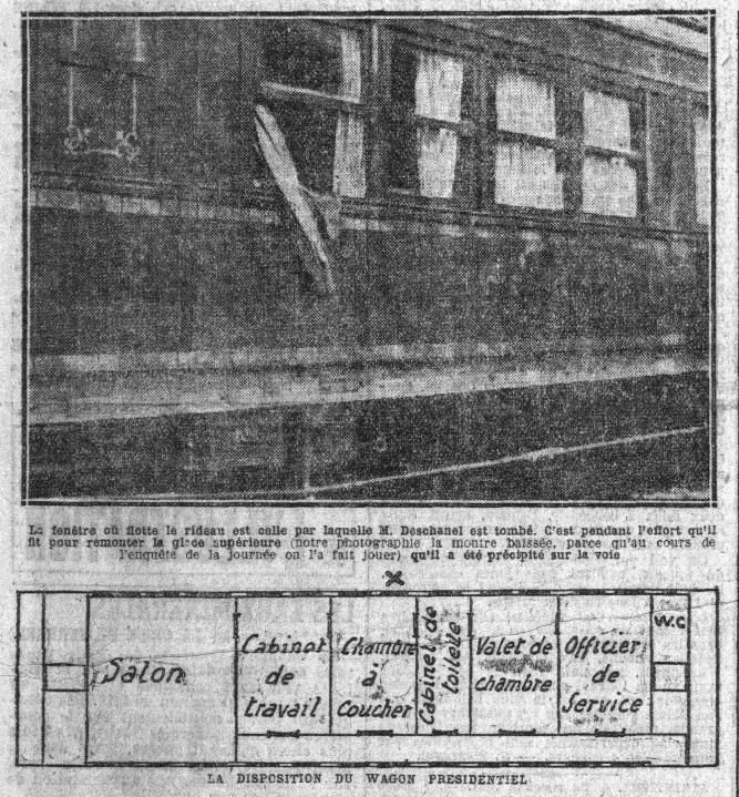 Une du quotidien Le Petit Parisien du 25 mai 1920 faisant état de la chute de train du président de la République, Paul Deschanel.